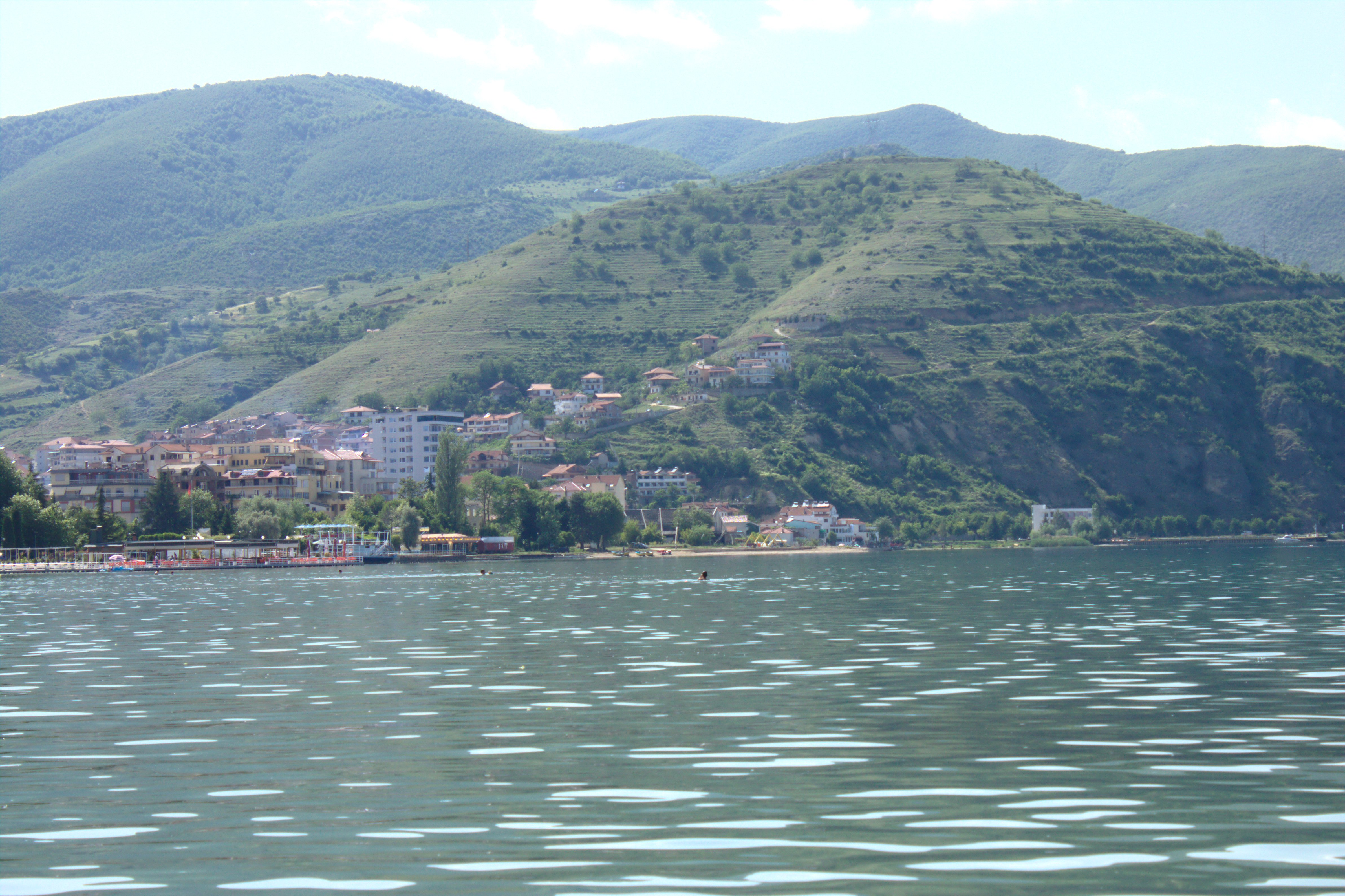 Břeh jezera ve městě Pogradec ve východní Albánii